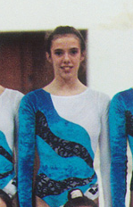 Débora Alonso en el Gimnasio Moscardó (Madrid) en 1991.